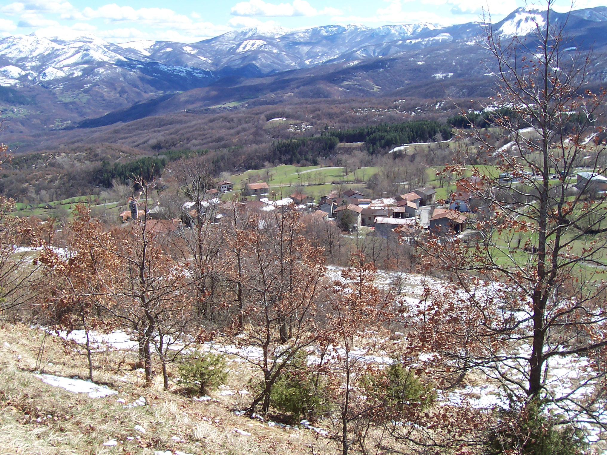 Grondone Sopra visto da una collina circostante